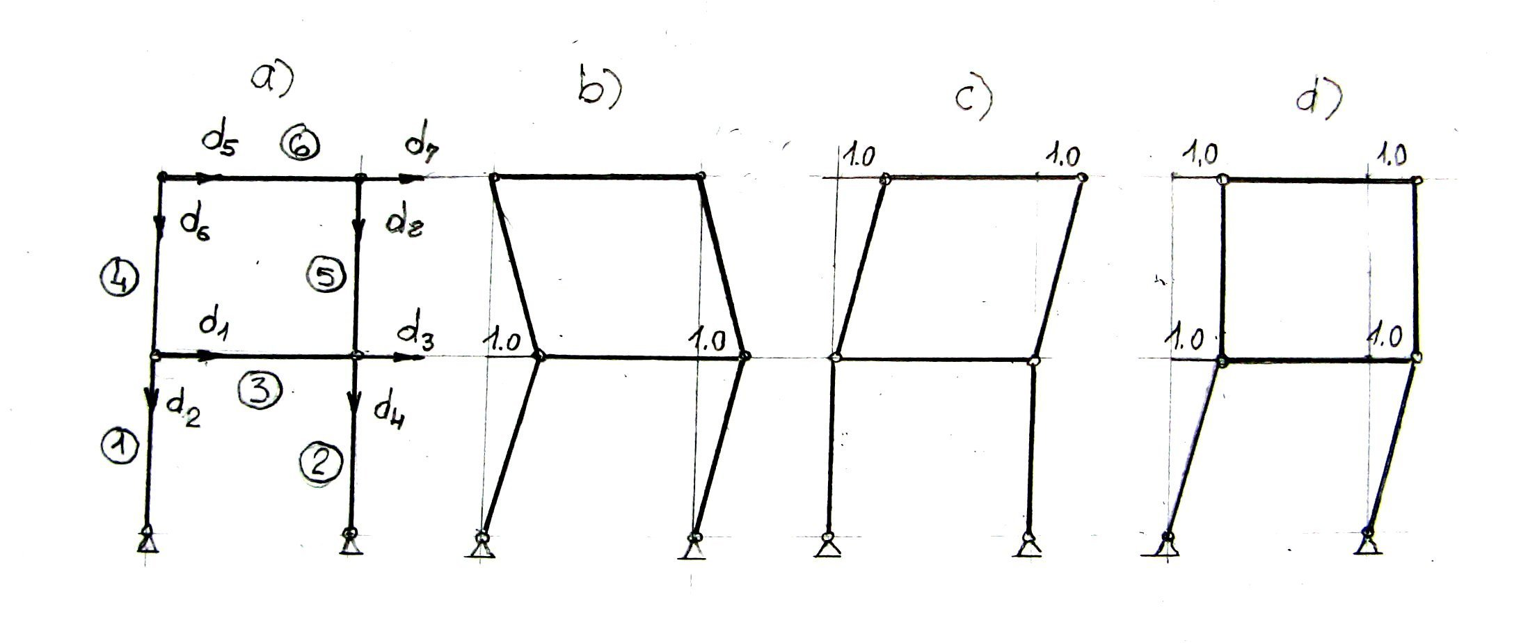 Analiza ruchliwości łańcucha kinematycznego